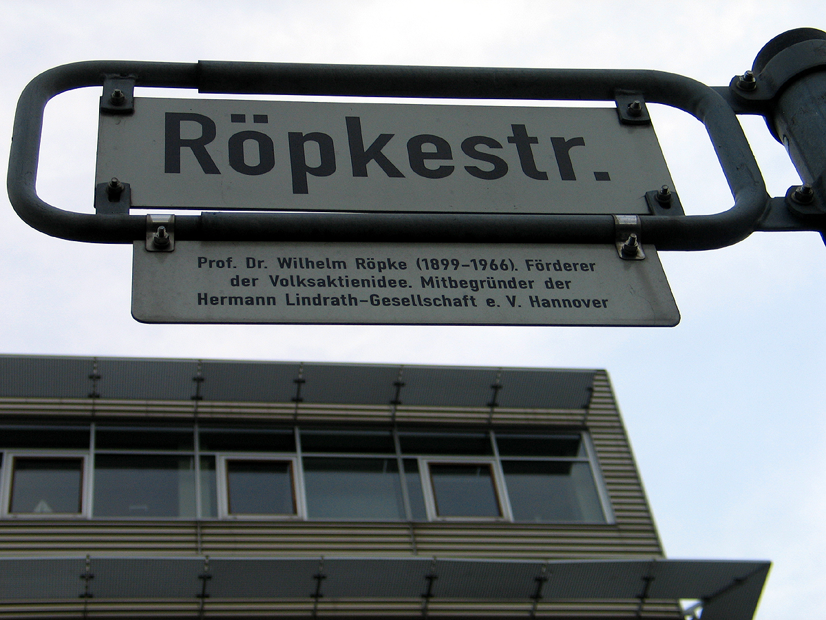 Straßenschild mit Legende an der Röpkestraße in Hannover: „Prof. Dr. Wilhelm Röpke 1899-1966, Förderer der Volksaktienidee. Mitbegründer der Hermann-Lindrath-Gesellschaft e.V.“ ...